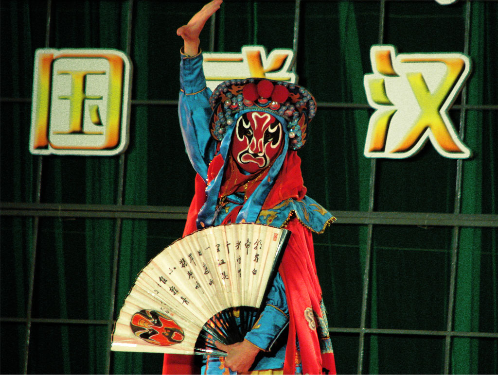 变脸